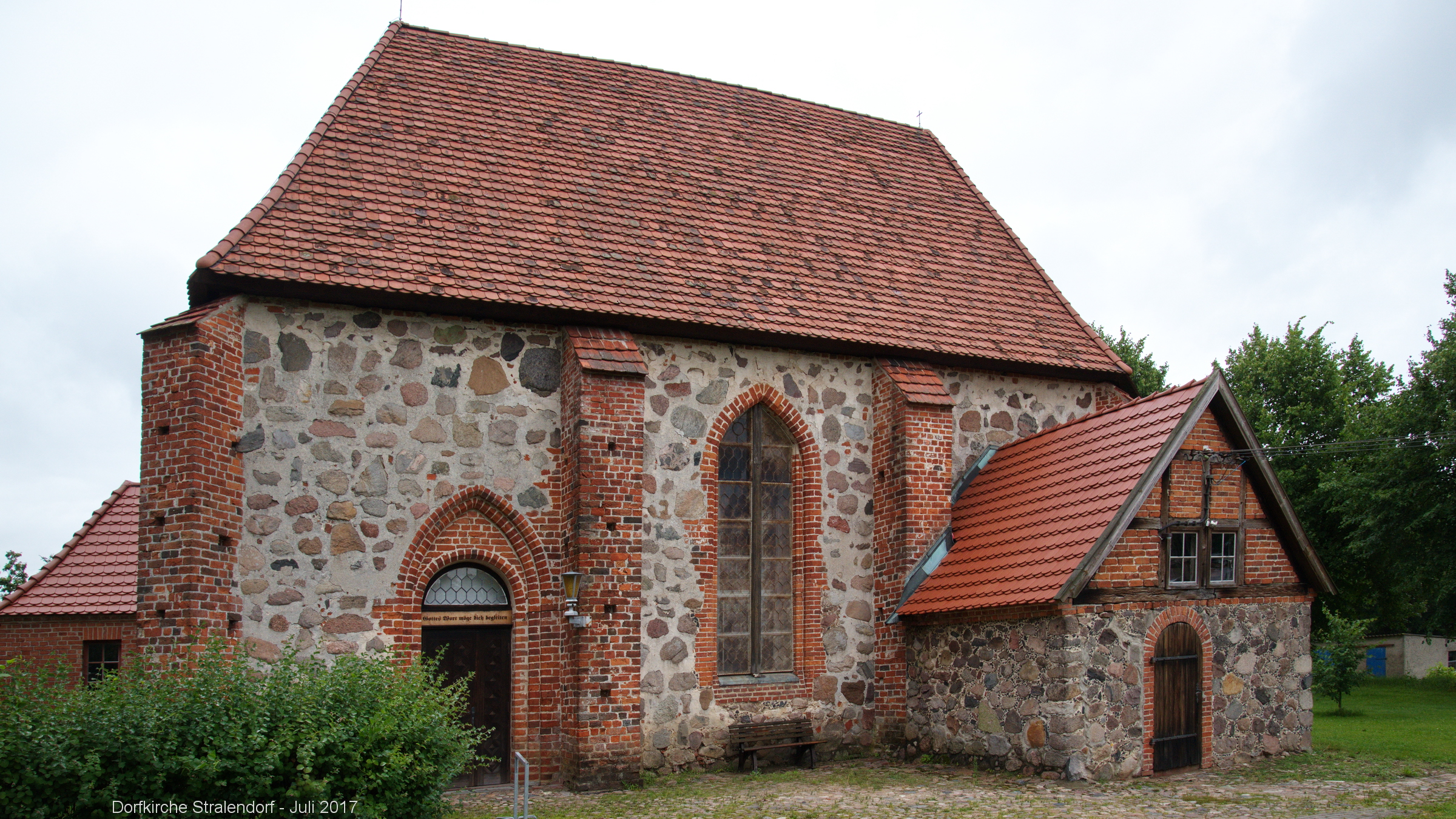 Stralendorf - Dorfkirche mit separatem Glockenturm